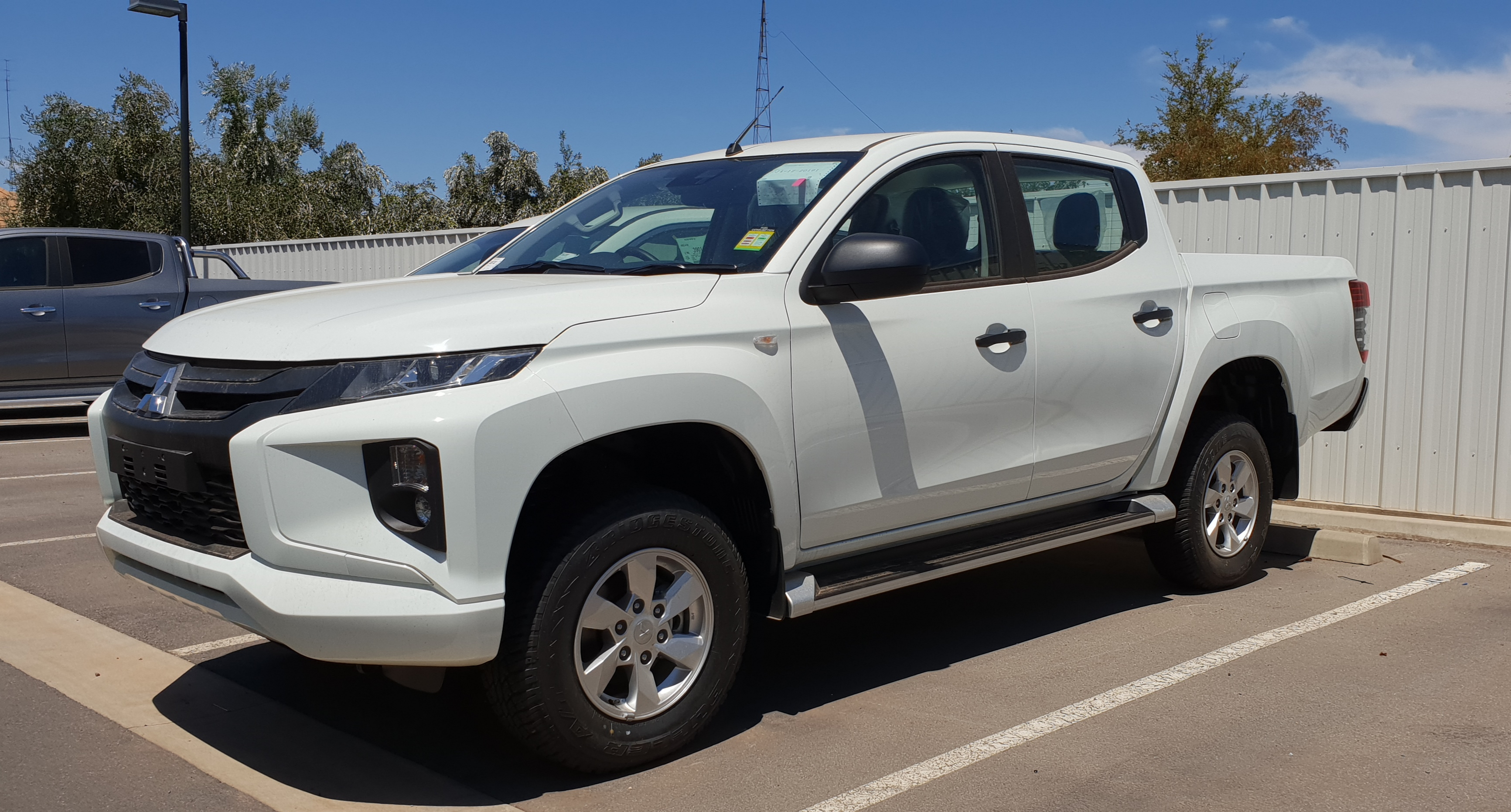 2018 Mitsubishi Triton GLX+